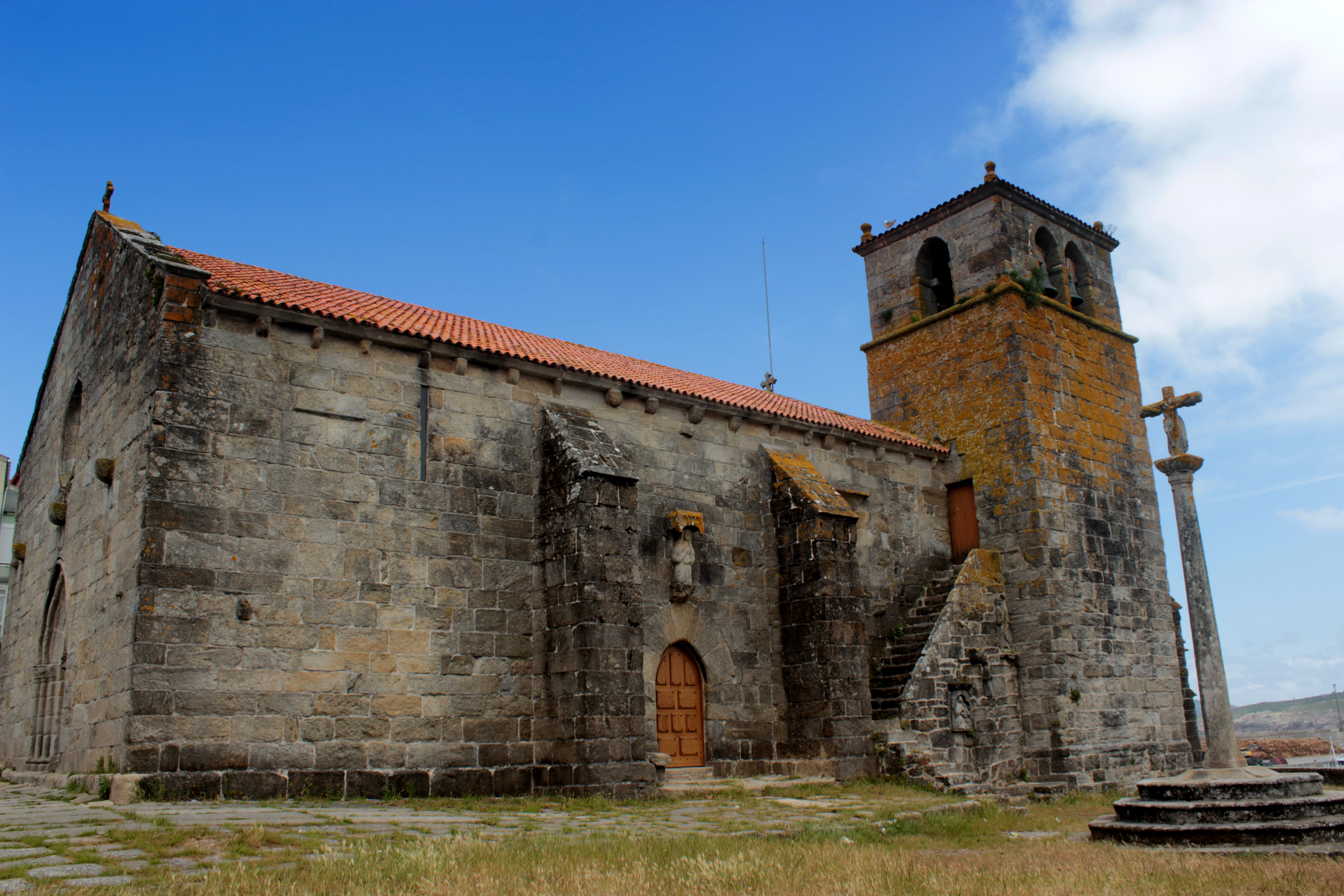 Laje